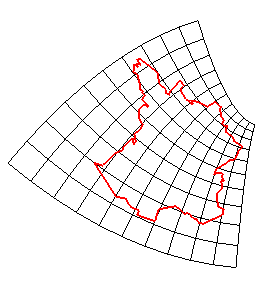 france par t conforme r ferreol